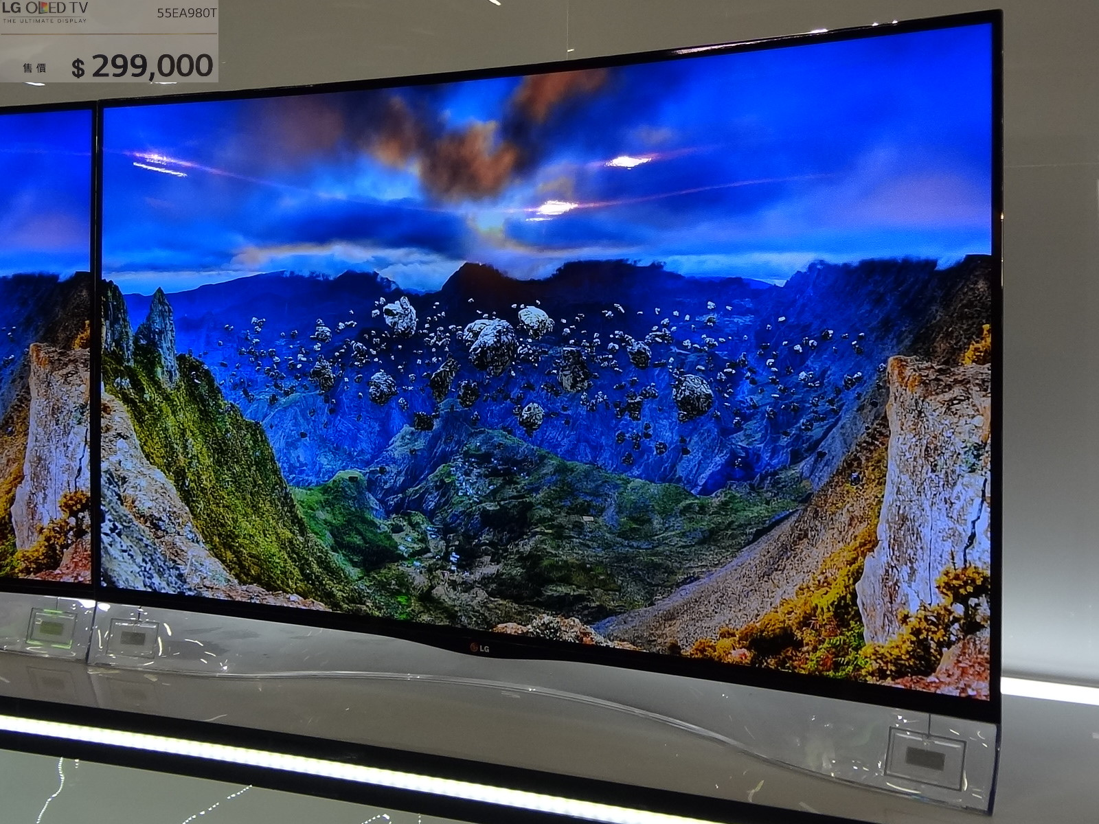 2013年資訊月，台灣樂金電器展示的OLED電視55EA980T。